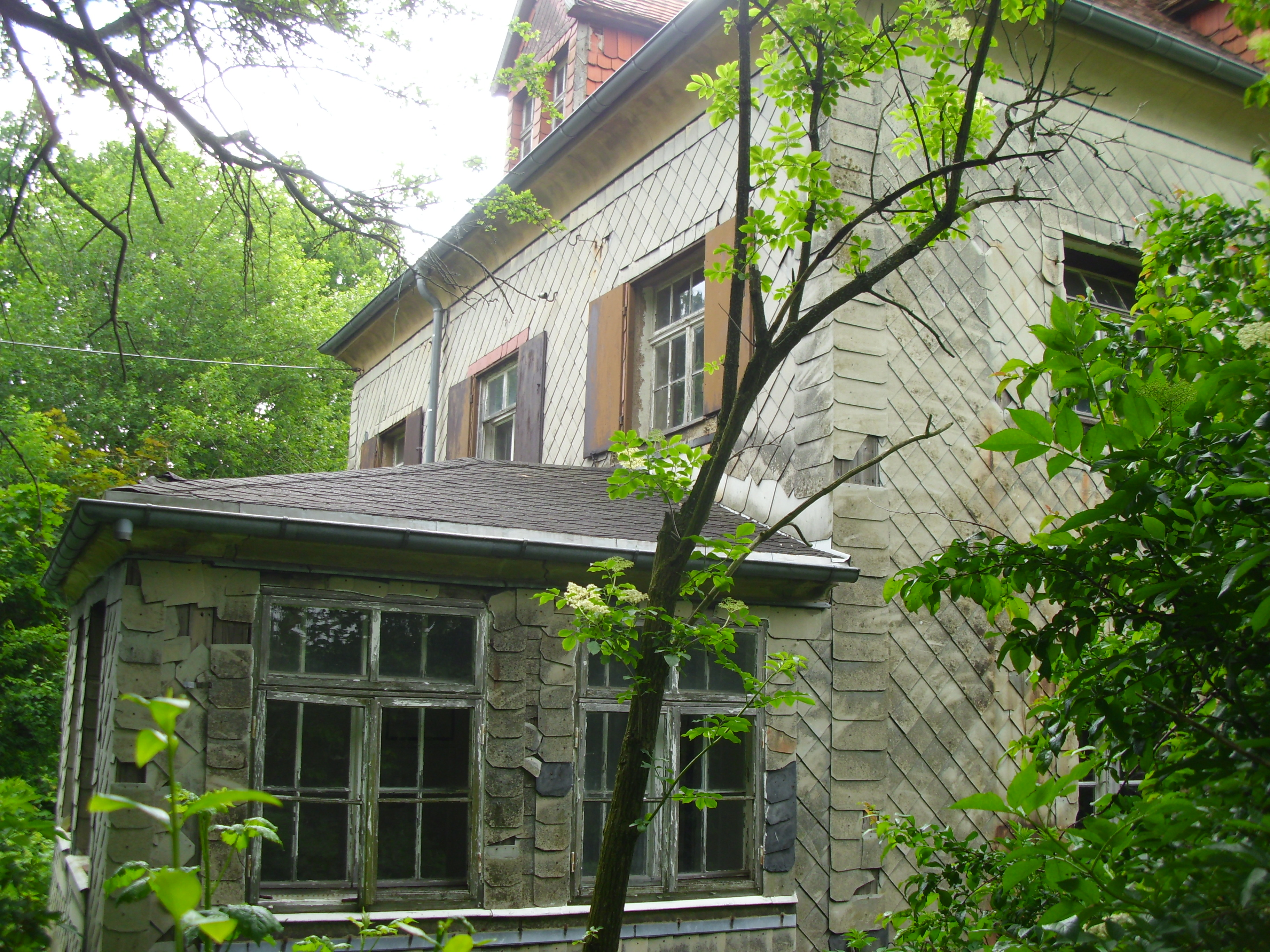 Eine Ansicht des Vorderen Freigutshaus Kleinoesla, in dem sich die Stuben befanden.